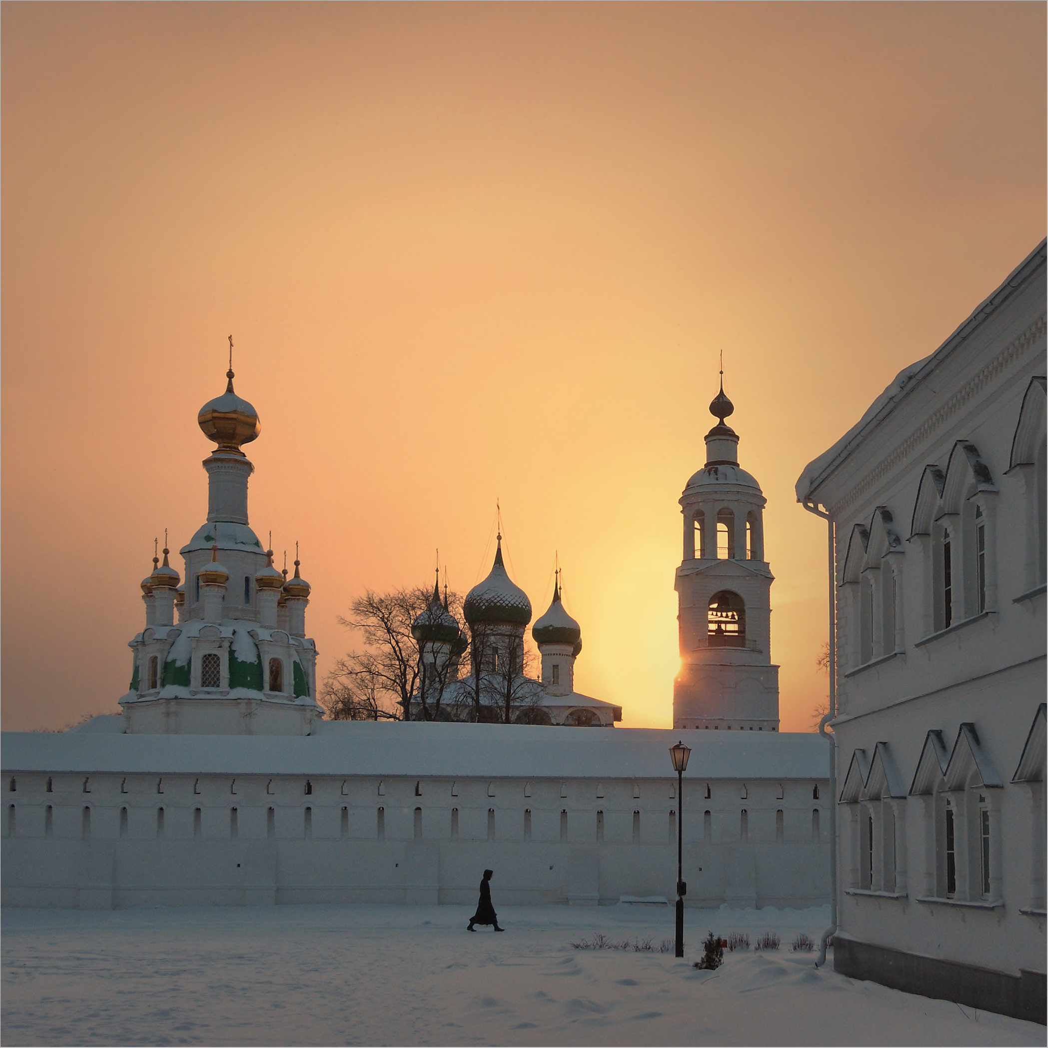 Монастырь Толгский (Ярославская область, Ярославль, посёлок Толга)